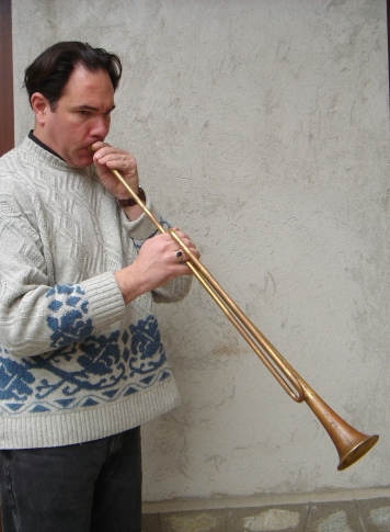 Bias de jogar la trompeta de colissa anciana.